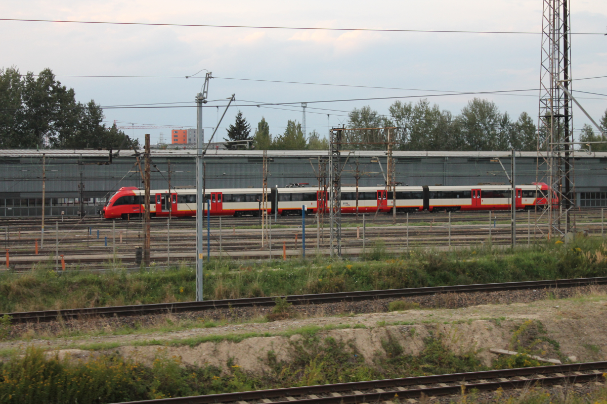 Tory odstawcze stacji postojowej Warszawa Szczęśliwice. This photo was taken during Railway Wikiexpedition 2014 set up by Wikimedia Polska Association in cooperation with Fundacja Grupy PKP. You can see all photographs in category Wikiekspedycja kolejowa 2014.